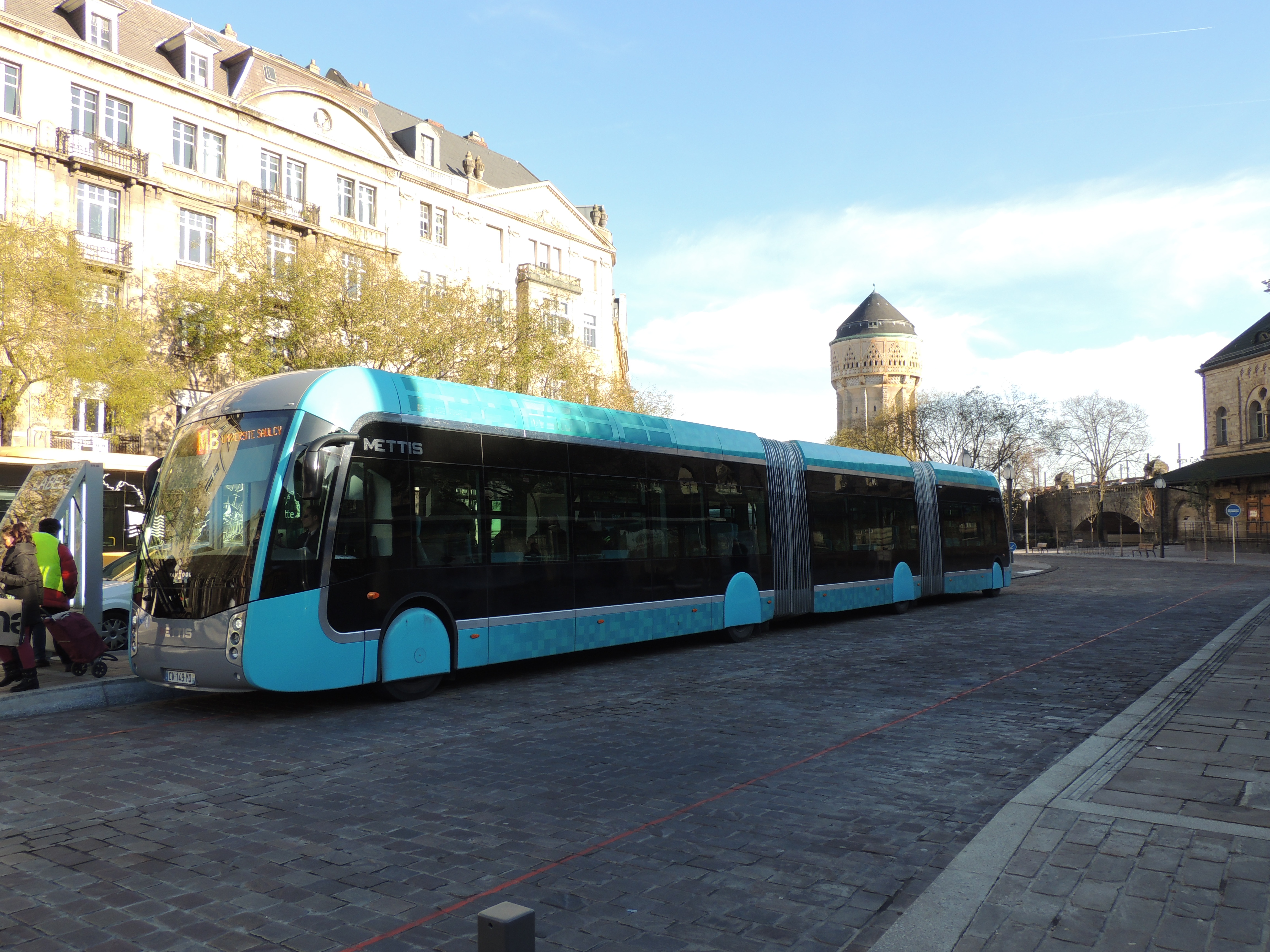 Can Hool Metz